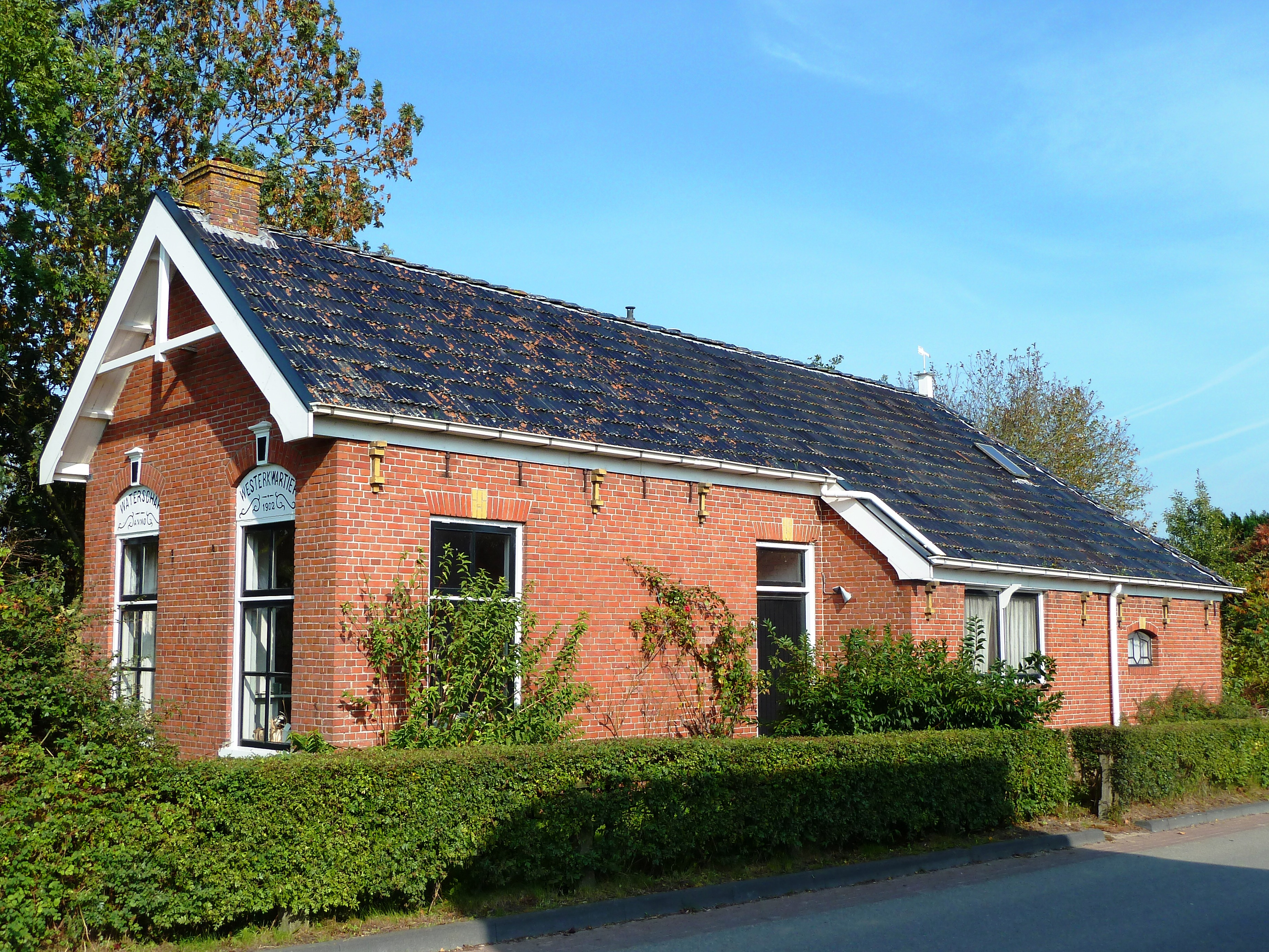 Sluiswachterswoning (1902) bij de (zijl) van Kommerzijl.